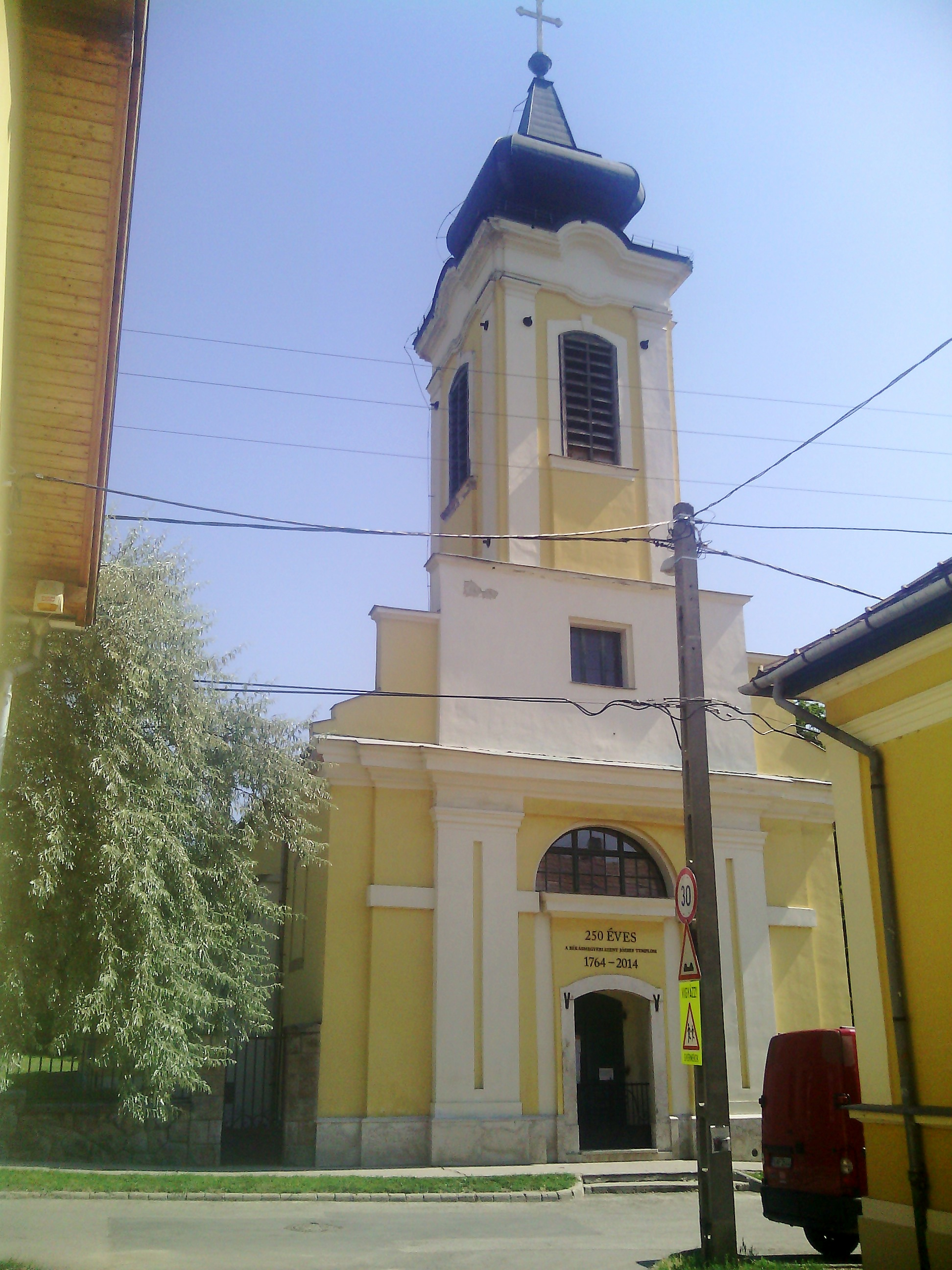 Szent József-templom, Békásmegyer-Ófalu